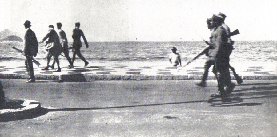 Revolta dos 18 do Forte de Copacabana: tenentes vão de encontro às forças legalistas, na Avenida Atlântica, Rio de Janeiro, 6/7/1922